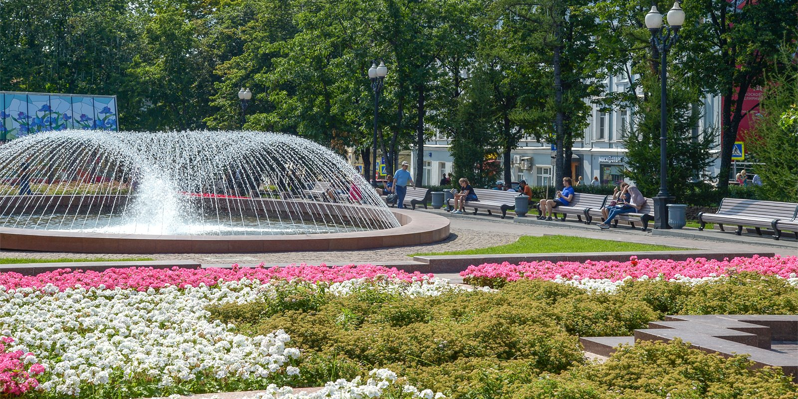 Новопушкинский фонтан в одноимённом сквере